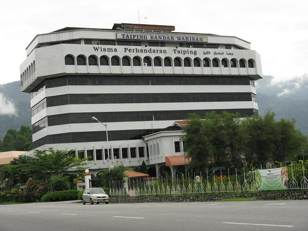 Taiping Municipal